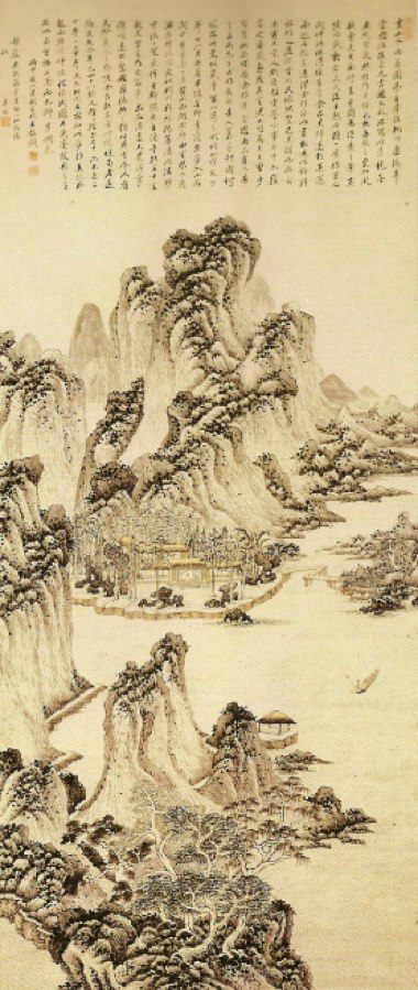 Le pays des songes par le peintre chinois Wang Jian (1598-1697). Rouleau mural, encre et couleurs sur papier, daté 1656. (162,8x68 centimètres). Cette œuvre est conservée au musée impérial de Beijing.